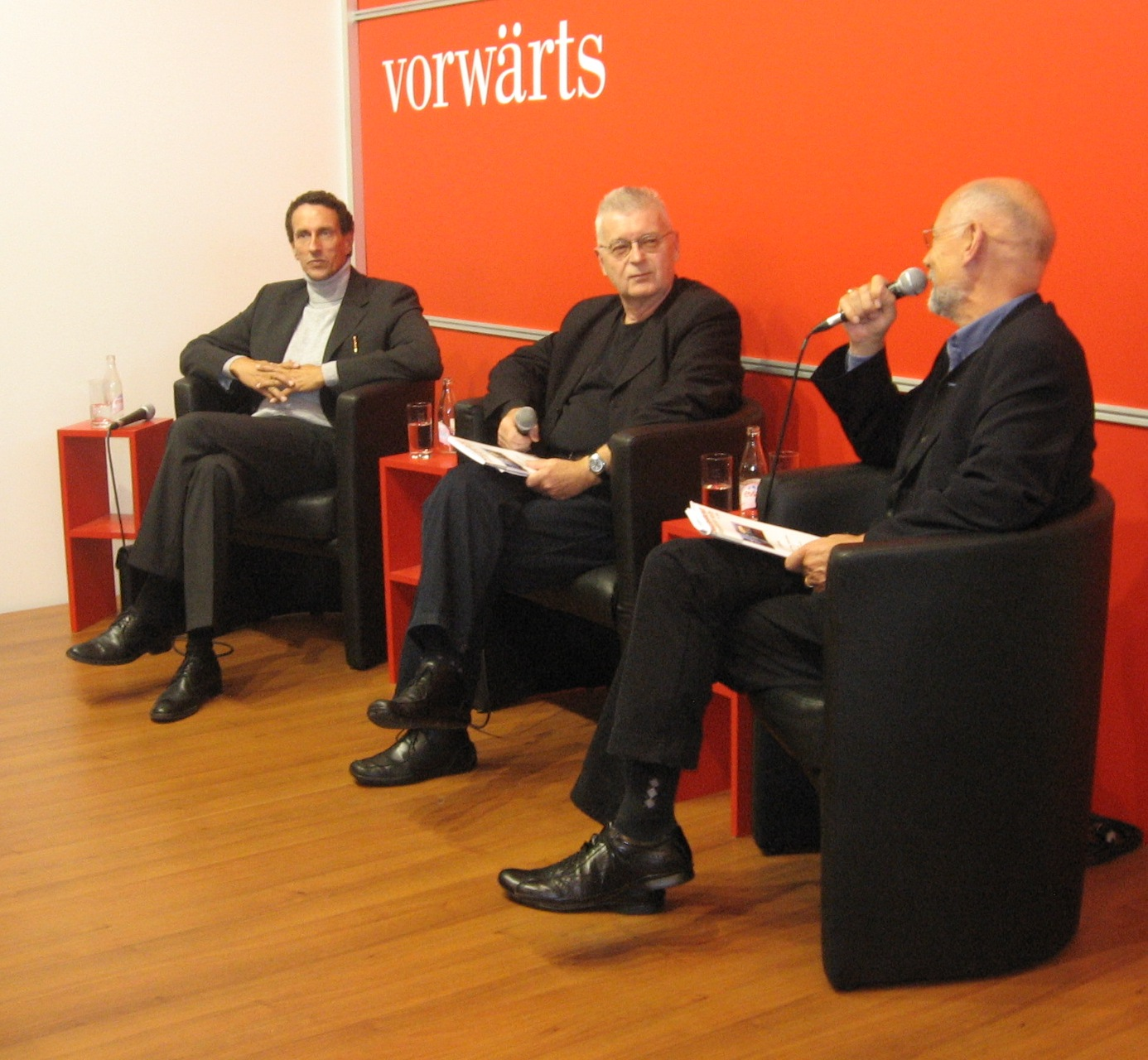 Diskussion auf dem Stand der Zeitung Vorwärts auf der Frankfurter Buchmesse. Links sitzt Julian Nida-Rümelin, in der Mitte Thomas Meyer und rechts Gert Heidenreich.